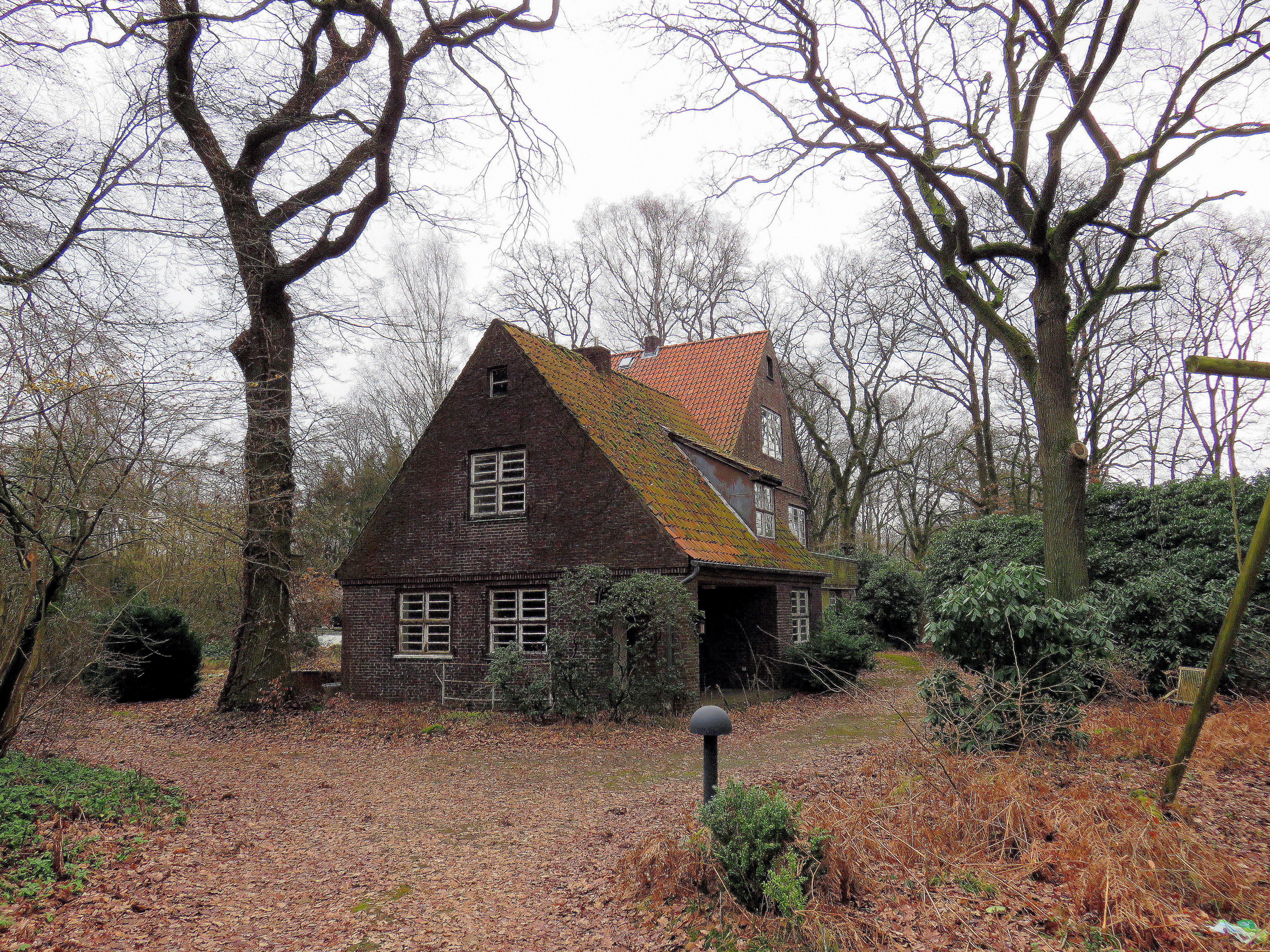 Grundstück mit Wohnhaus, Ateliers und Werkstätten der deutschen Künstlerfamilie Emil Maetzel, seiner Ehefrau Dorothea Maetzel-Johannsen und Tochter Monika Maetzel, entstanden 1921-1925. Situation März 2017. This is a photograph of an architectural monument.